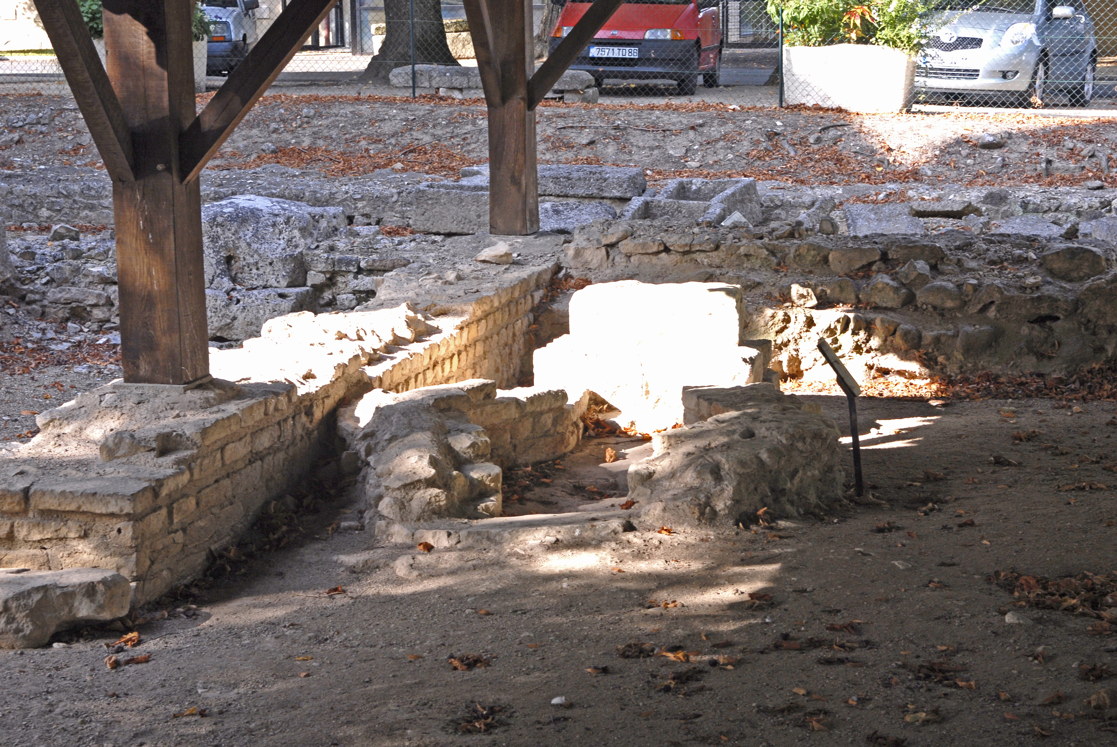 Civaux, Baptisterium mit Taufbecken, im ehem. fanuv von O